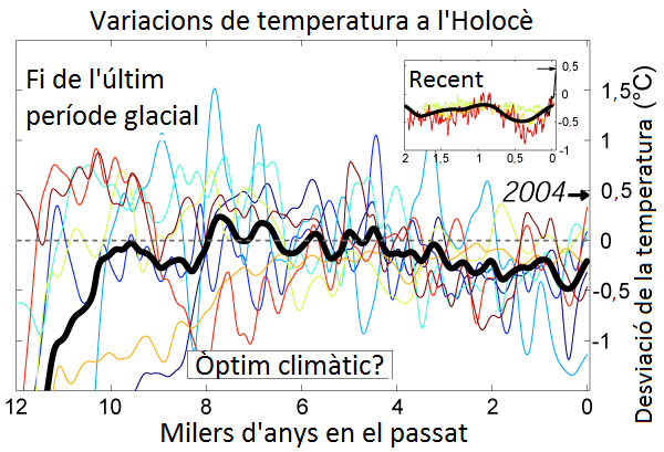 El gràfic mostra l'evolució de les temperatures durant l'Holocè. Es mostra la desviació respecte a les temperatures actuals.